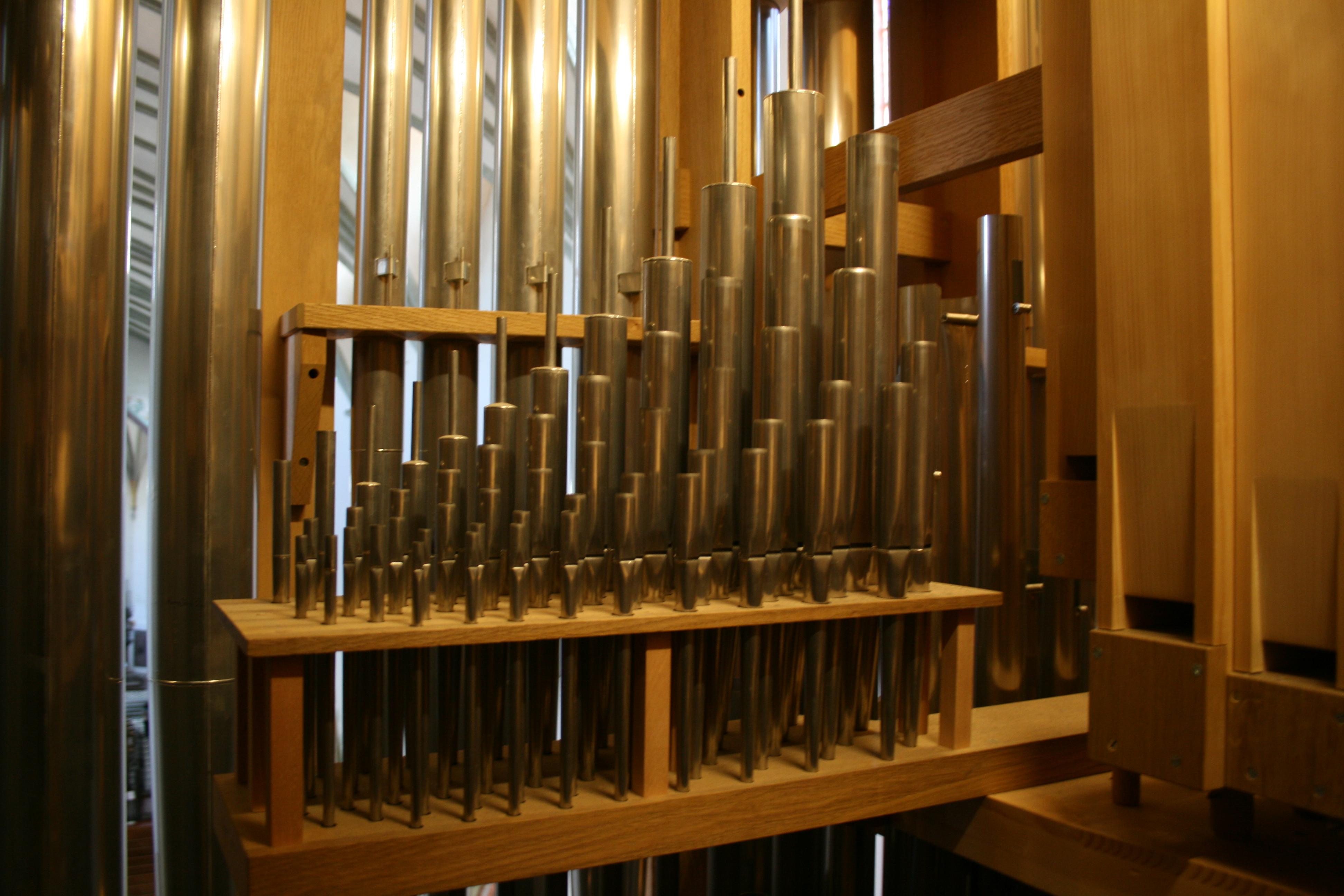 Innenleben der Goll Orgel in St. Martin, Memmingen. Freihstehendes Kornettregister